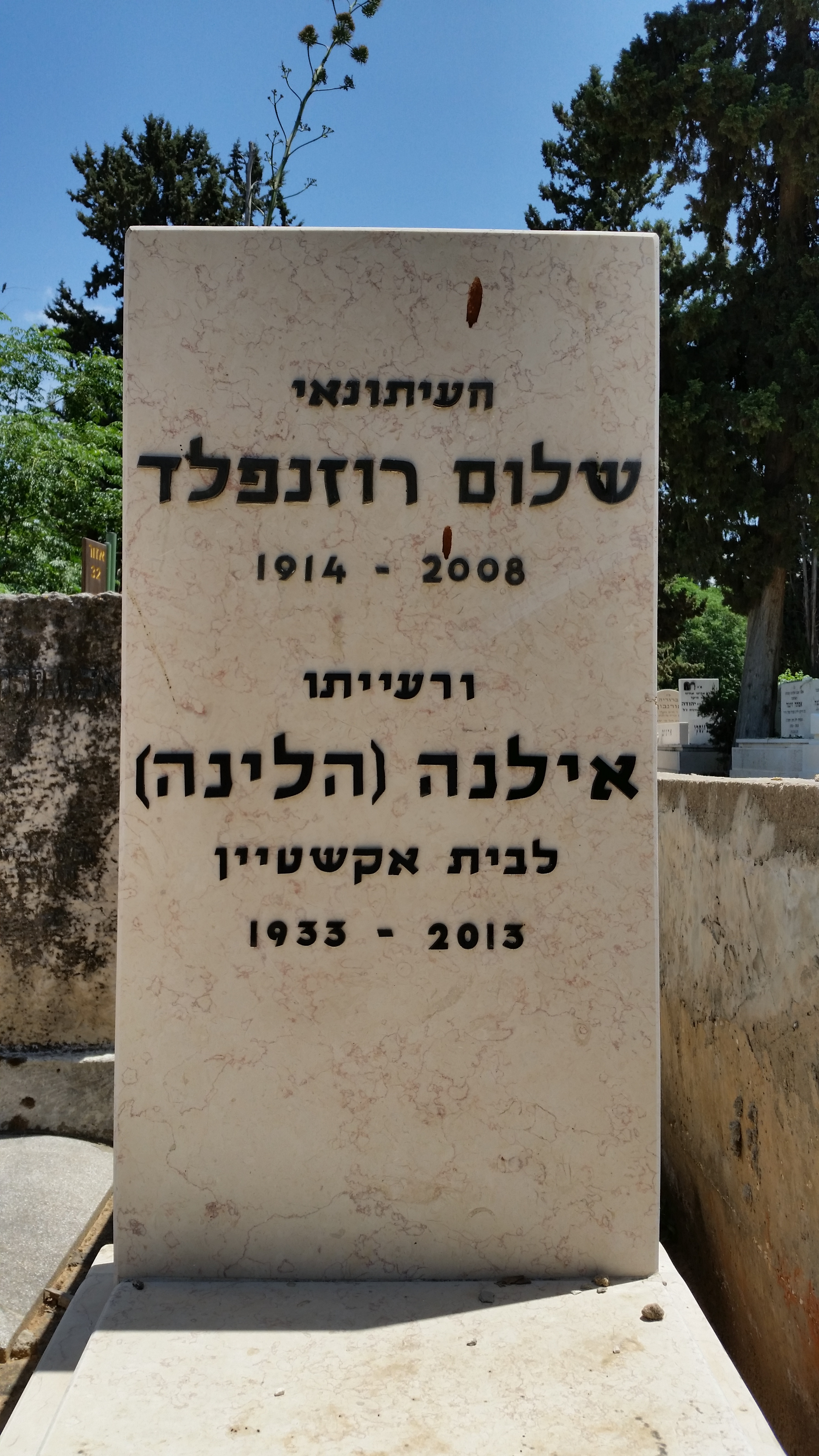 קברם של העיתונאי שלום רוזנפלד ואשתו השניה אילנה בבית הקברות נחלת יצחק